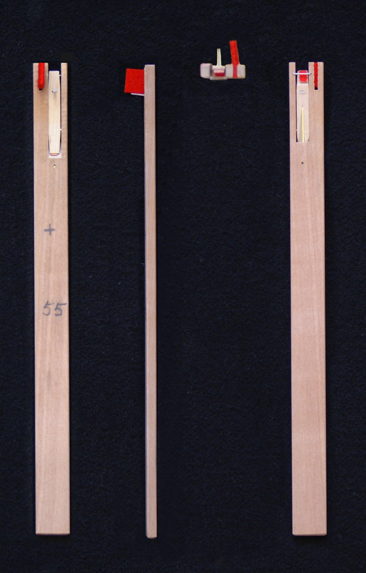 Cembalospringer in historischer Bauart; ohne Reguliermöglichkeiten